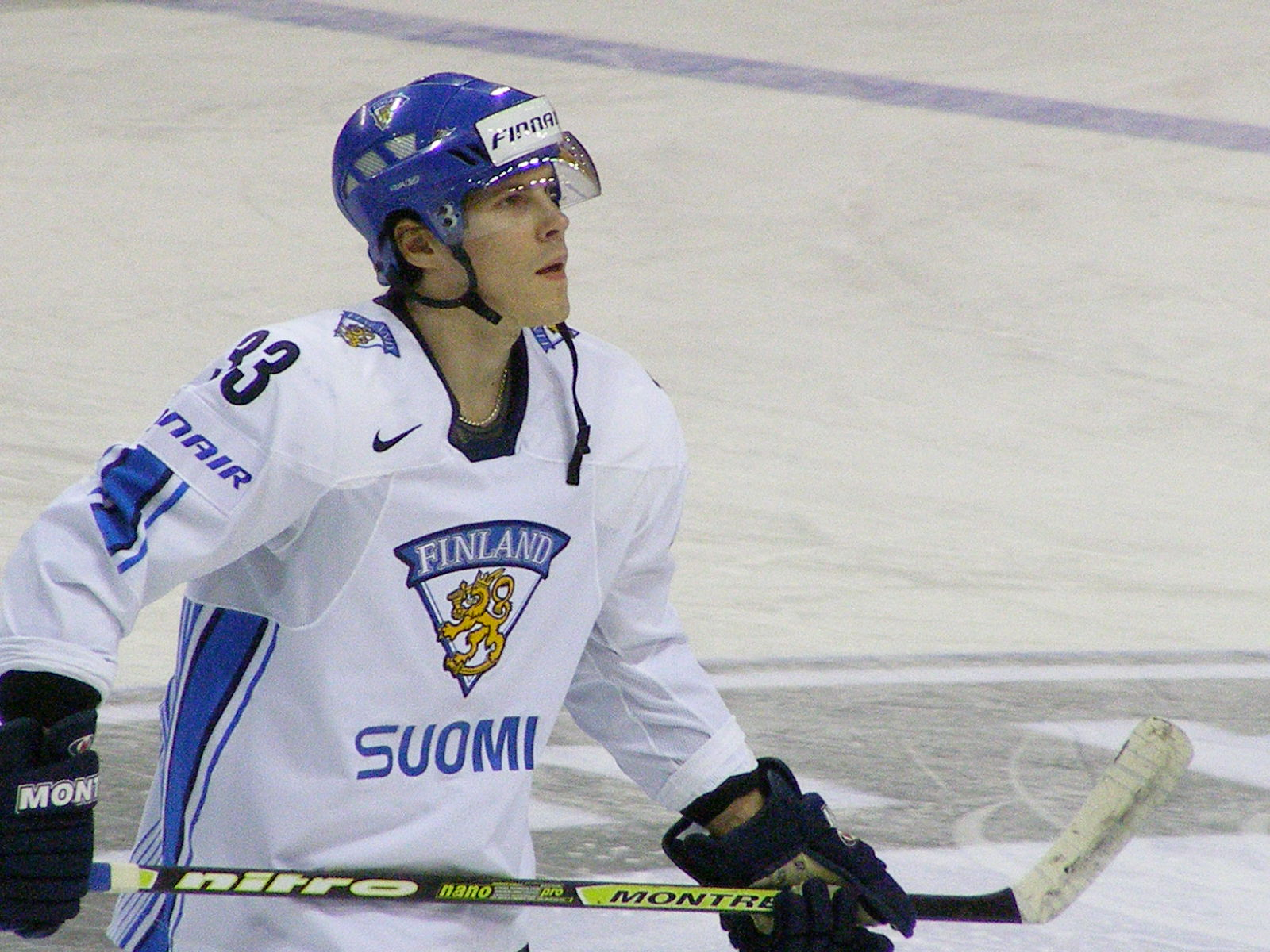 Anssi Salmela jääkiekon MM-kisoissa 2008.